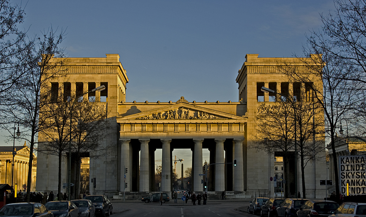 Propyläen München - Königsplatz